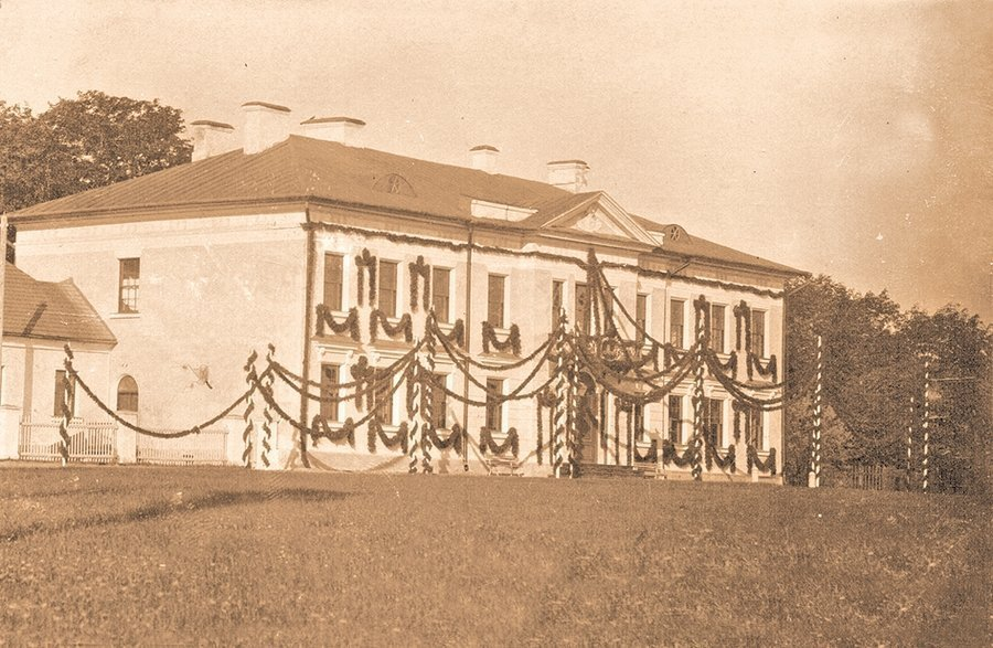 Беларуская (тарашкевіца): Бешанковічы (Biešankovičy), палац Храптовічаў (Chraptovič)